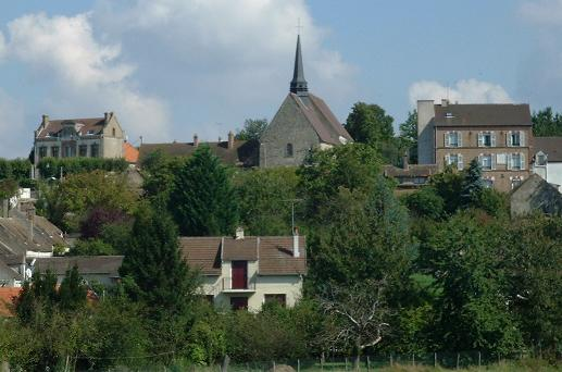 Vue du Village ancien. À gauche de l'église (XVIIème siècle), la Mairie et à droite, la Maison de Retraite. Photo personnelle